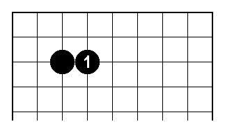 Go-Spiel: Erweiterung durch ein 'Nobi'